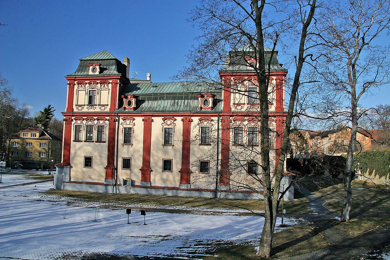 Zámek v obci Svojšice v okrese Kolín